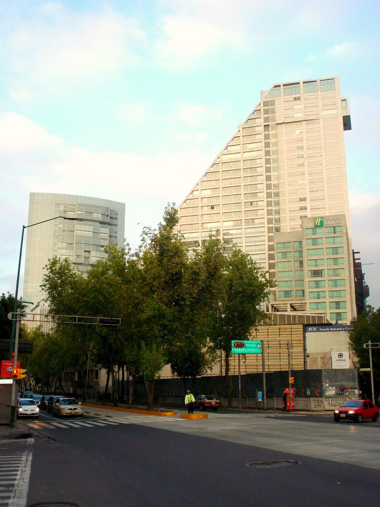 Cruce de Paseo de la Reforma con la Avenida Insurgentes Centro, también se observa el complejo de las tres torres de Reforma 222 y la cimentación de la Torre Punta Reforma.